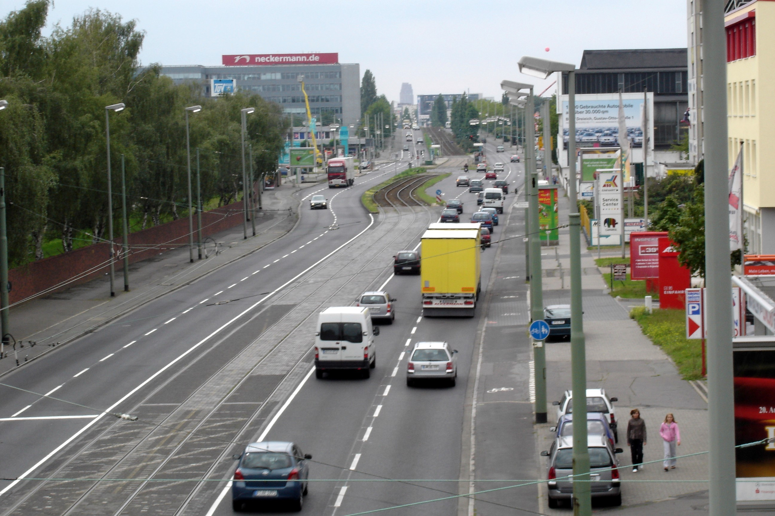 Blick von Cassellastraße Richtung Westen (Kaiserlei), Ffm-Fechenheim